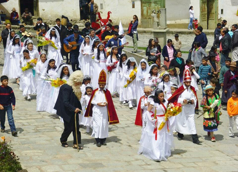 Reyes Magos